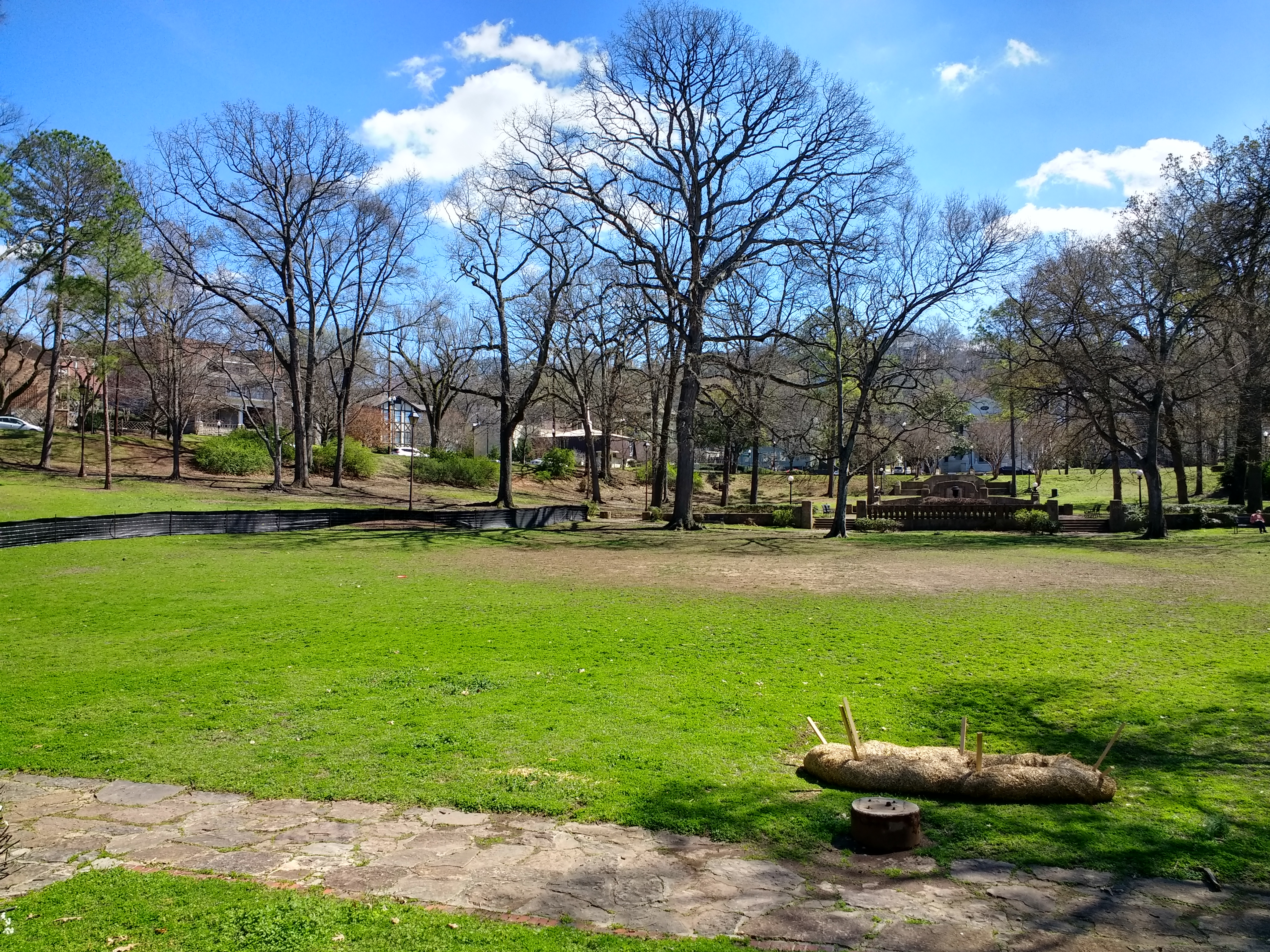 Rhodes Park in Birmingham, Alabama.